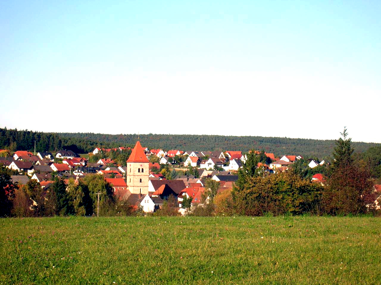 Gemeinde Heroldsbach